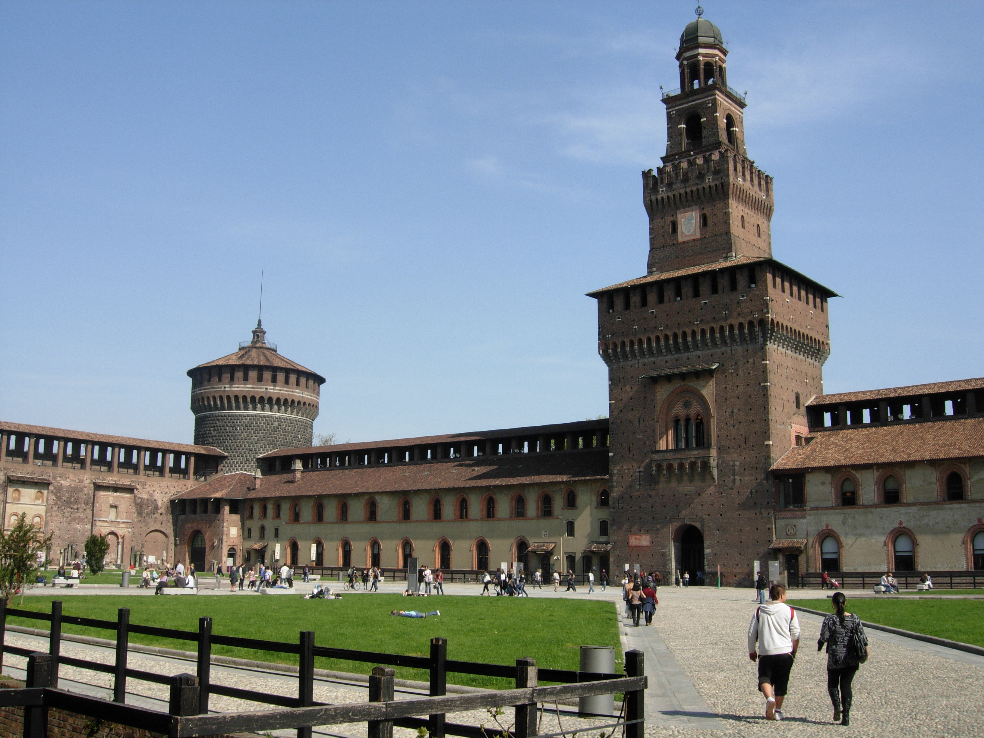 Castello Sforzesco - Milano